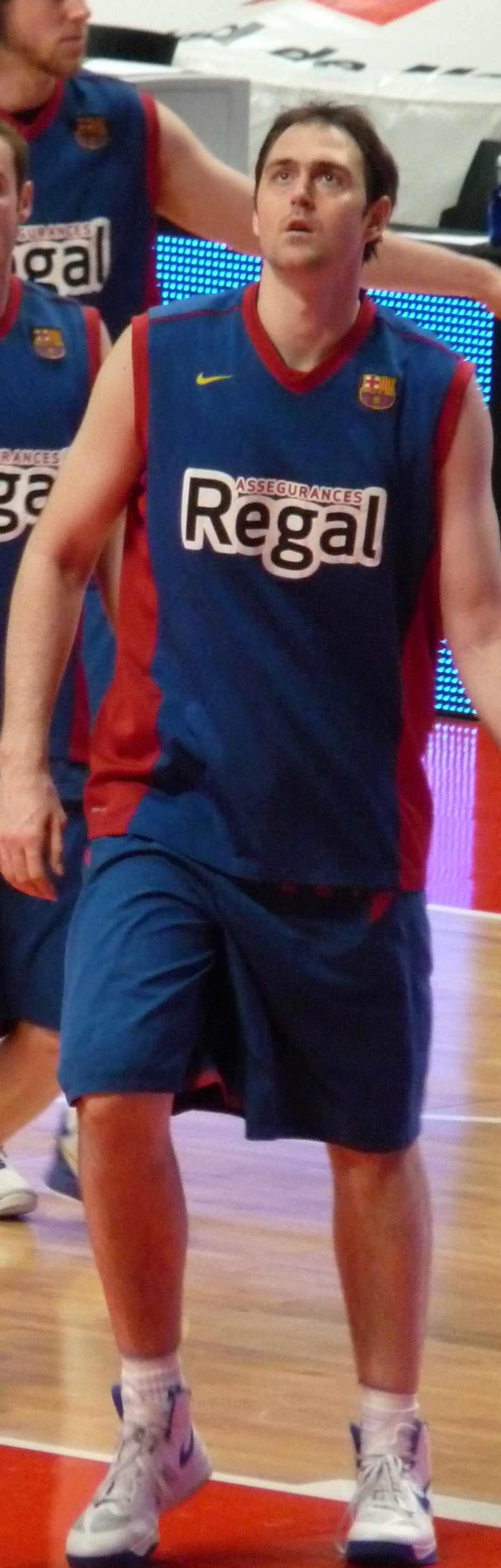 Erazem Lorbek